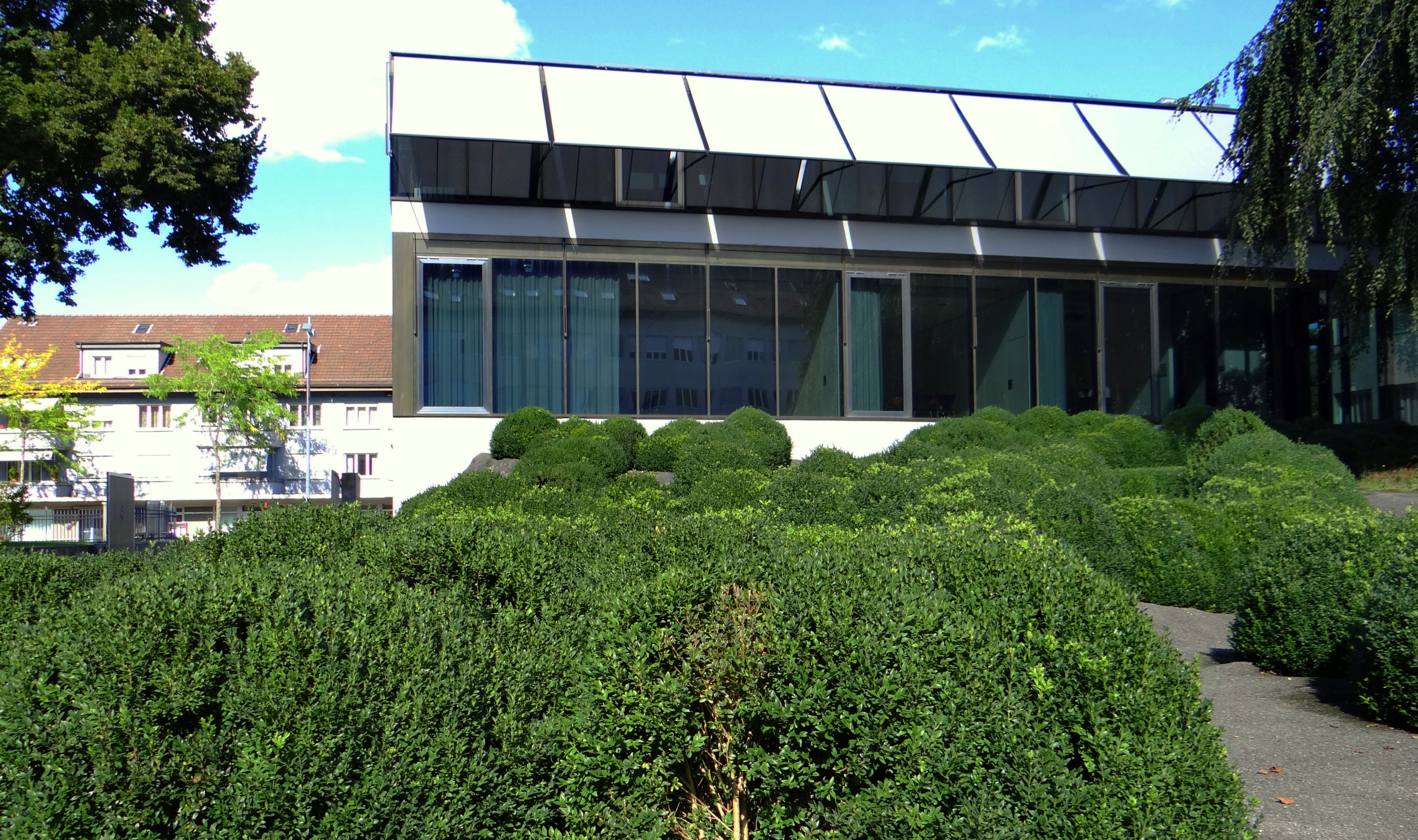 Archiv des Bundesamtes für Landestopographie (swisstopo)